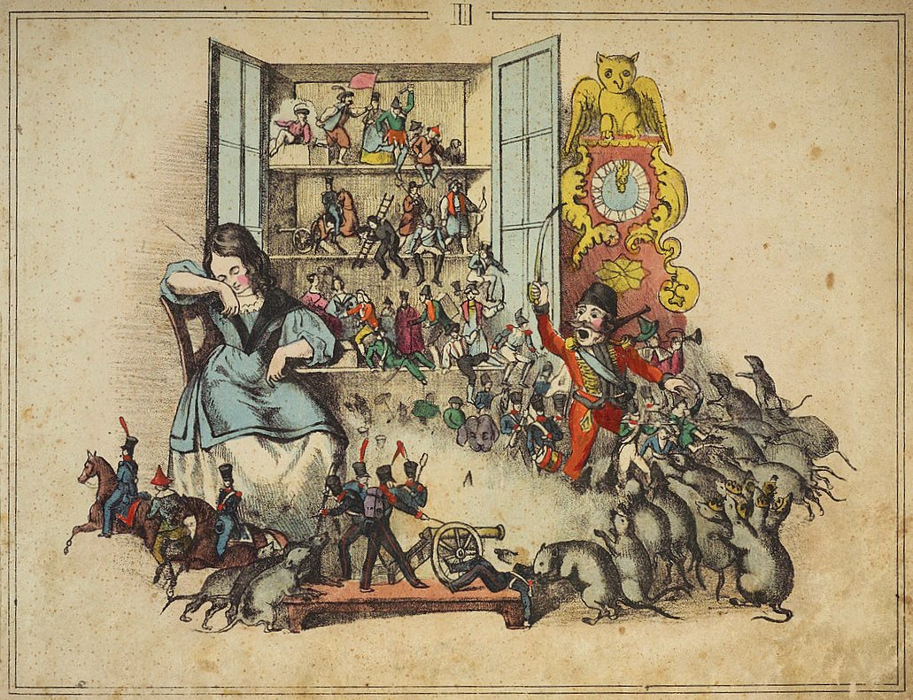 Иллюстрация Петера Карла Гайсслера к сказке Гофмана "Щелкунчик"